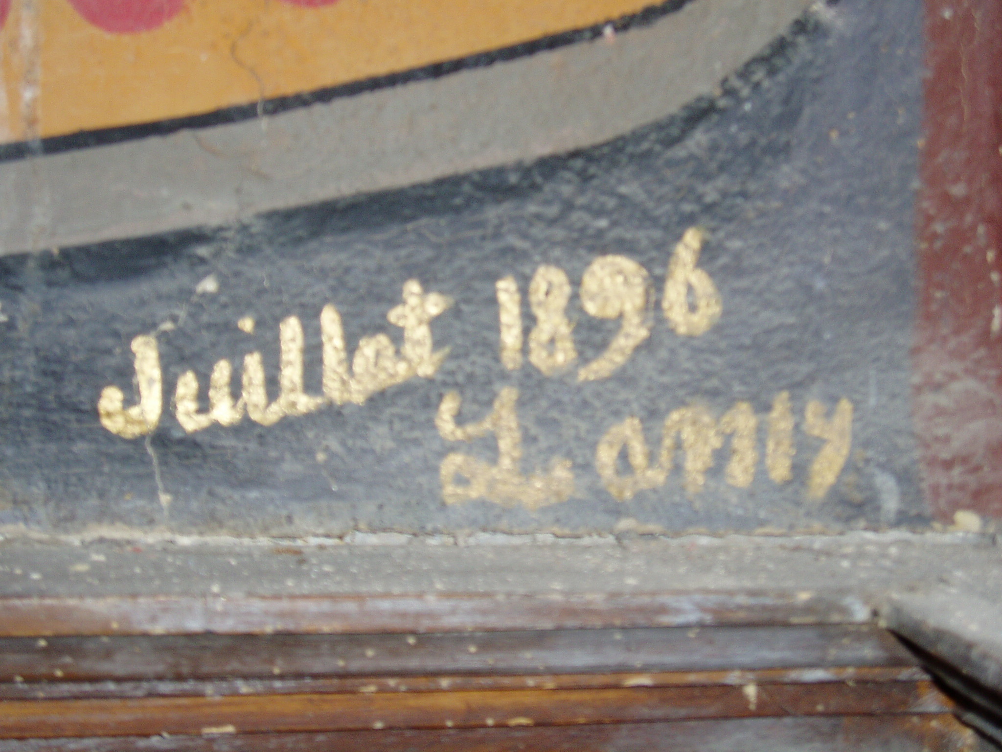 détail signature